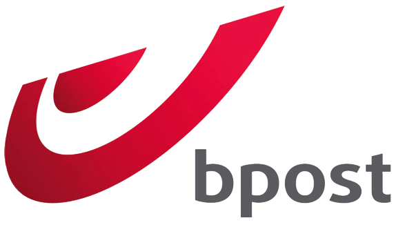 Logo van bpost